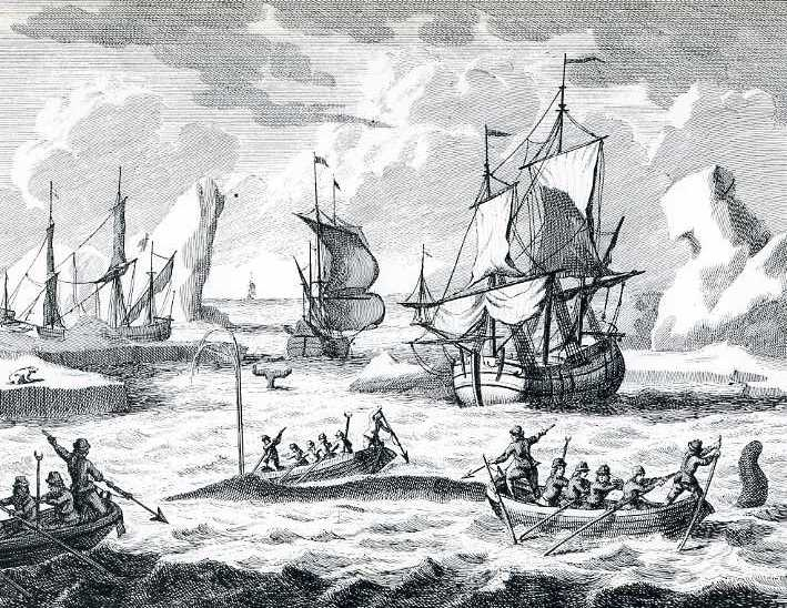 Kupferstich Adolf von der Laan (ca 1690 - 1742)